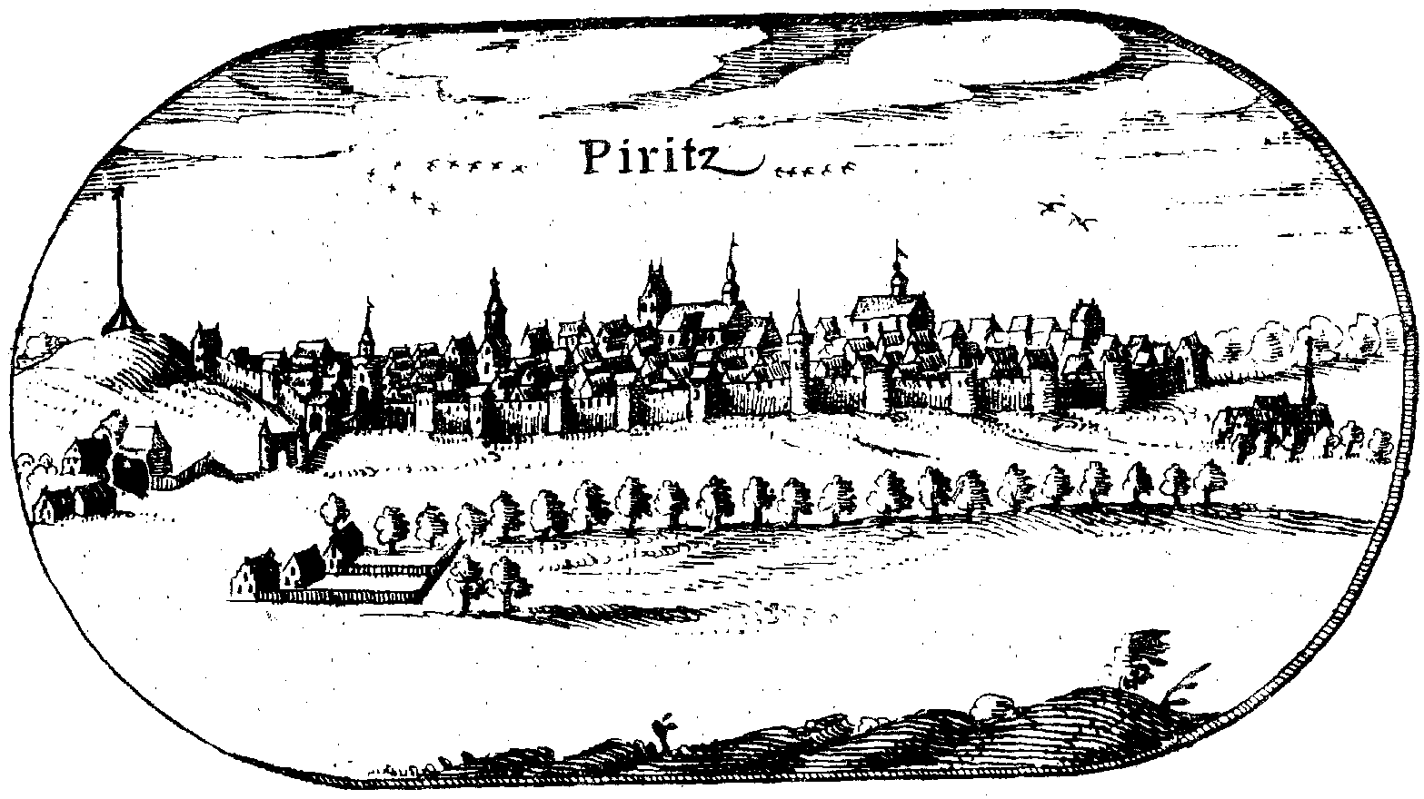 Rycina miasta Pyrzyce z mapy Lubinusa - Mapa księstwa pomorskiego z 1618 roku.